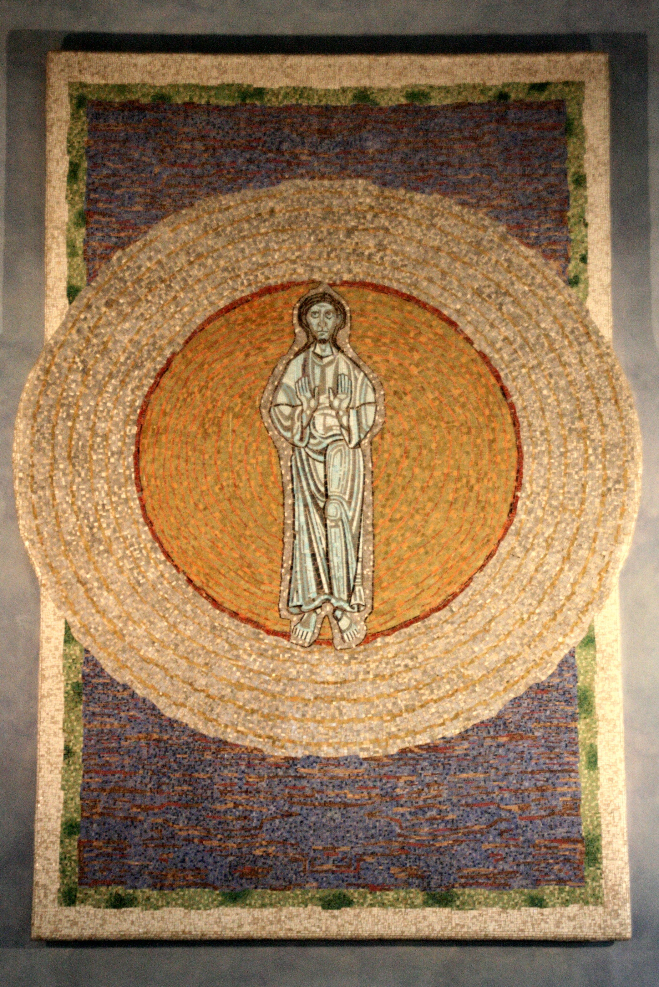 Altarbild der kath. Pfarrkirche St. Hildegard (Eibingen), Rüdesheim am Rhein. Mosaik entworfen 1965 von Ludwig Baur aus Telgte. Als Vorlage diente die Bildtafel 11 aus den Scivias-Kodex "Der Urquell des Lebens - Die wahre Dreiheit in der wahren Einheit".